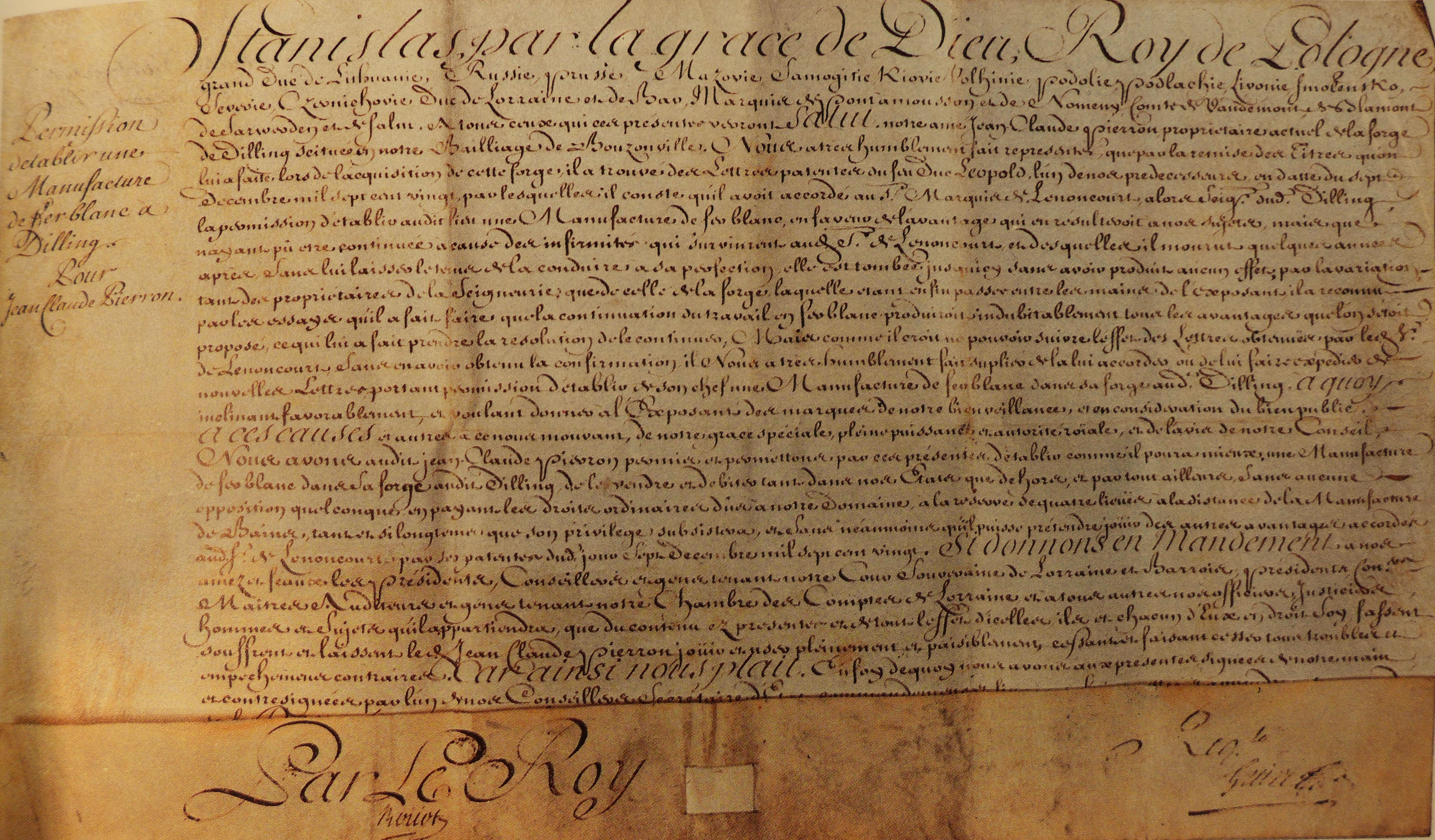 Stanislaus I. Leszczyński, König von Polen und Herzog von Lothringen: Erneuerung der Weißblechkonzession am 22. Oktober 1759 an Jean Claude Pierron, Eigentümer der Dillinger Hütte (Werksarchiv der Dillinger Hütte)